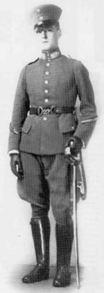 Salvador Allende hizo el servicio militar en el Regimiento Lanceros de Tacna, en 1925. Allí aprendió equitación.